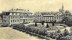 Dorstadt, ehemalige Klosteranlage, Rittergut, Zustand 1903